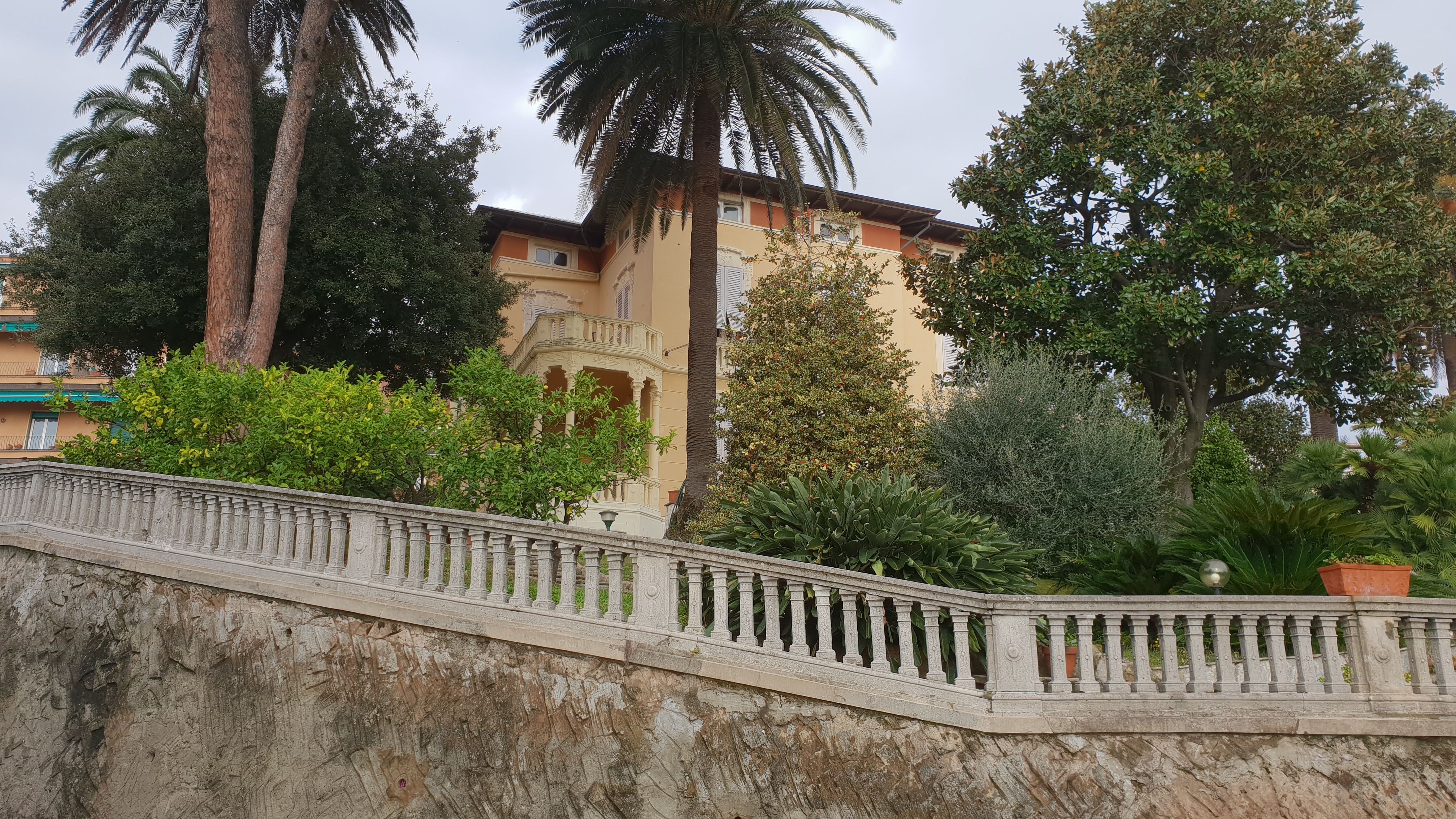 Lato Sud di Villa Perla, uno degli esempi più cospicui ed importanti di villa d'epoca della zona. E' attualmente di proprietà della famiglia Berta.